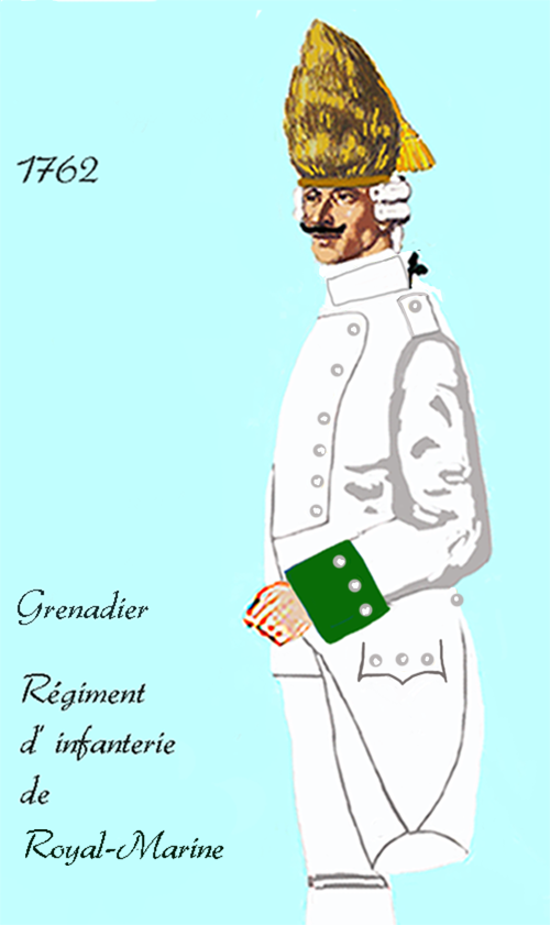 Uniform eines königlich französischen Infanterie-Regiments nach dem Choisel-Erlaß von 1762. - Entnommen und überarbeitet aus: „LES UNIFORMES ET LES DRAPEAUX DE L'ARMÉE DU ROI“ Marseille 1899.